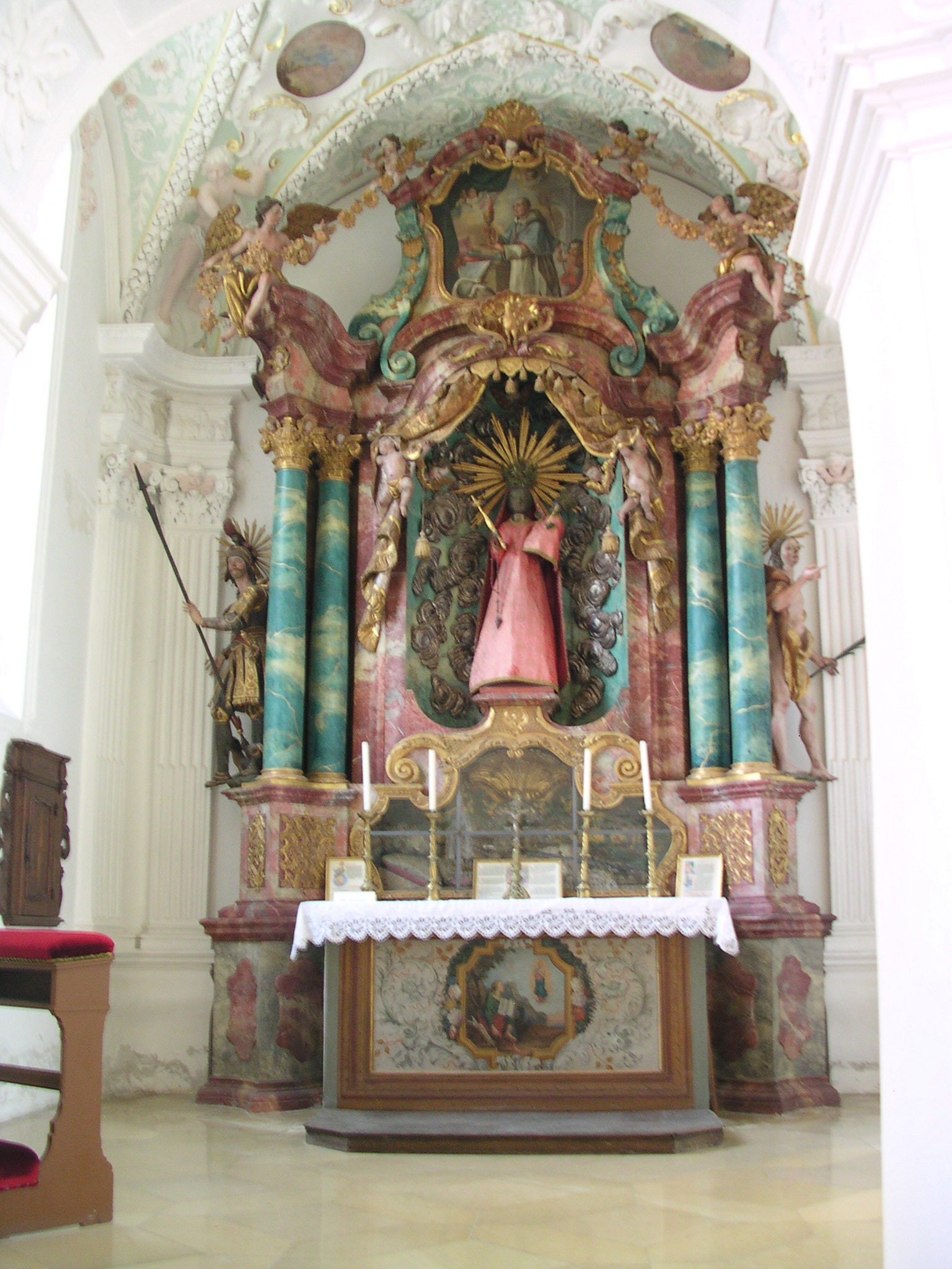 Altar im Kartausenmuseum Buxheim